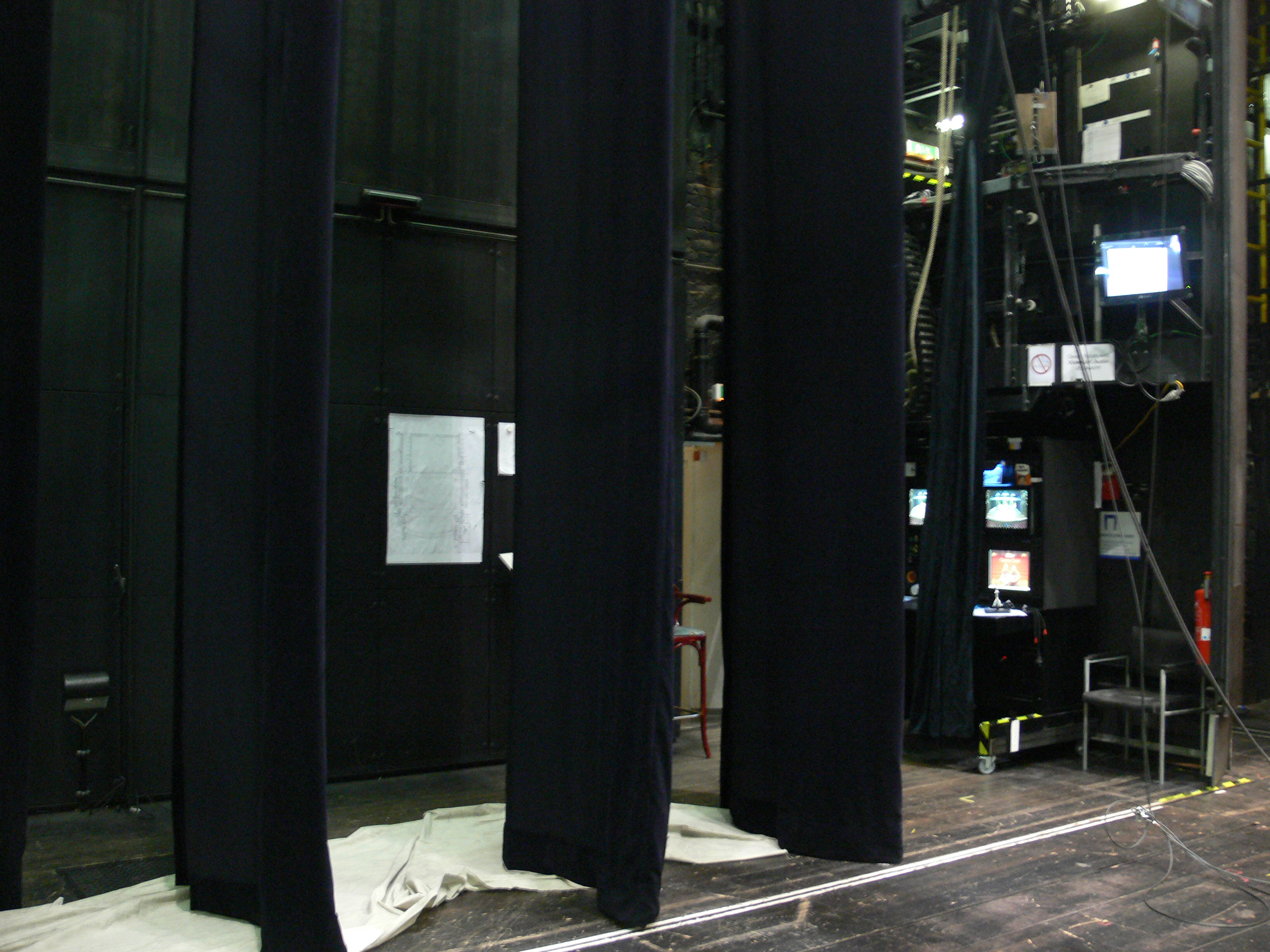 Theater Bielefeld, Inszipientenpult (Seitenbühne)